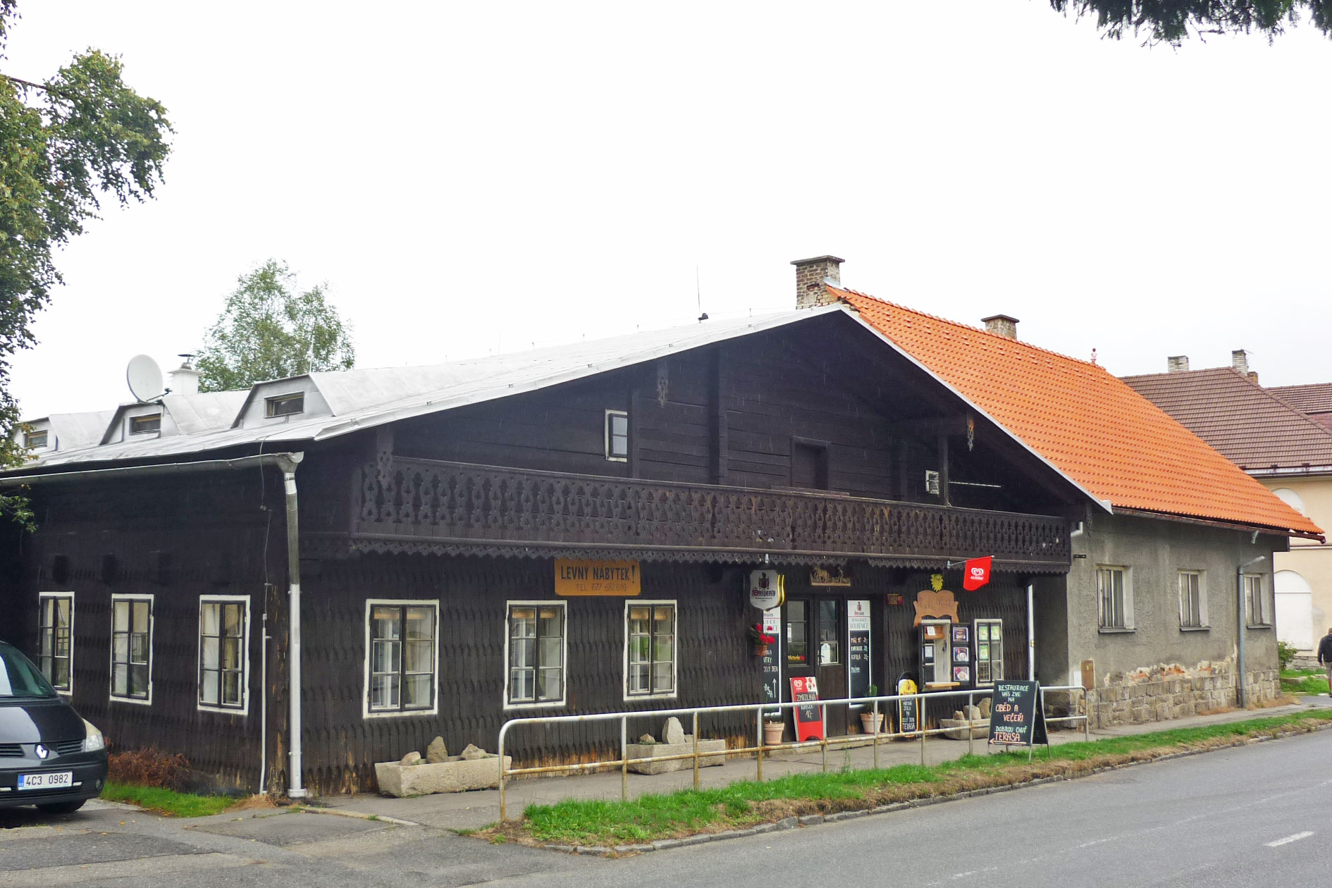 Soumarská čp. 55 a 56, Volary.